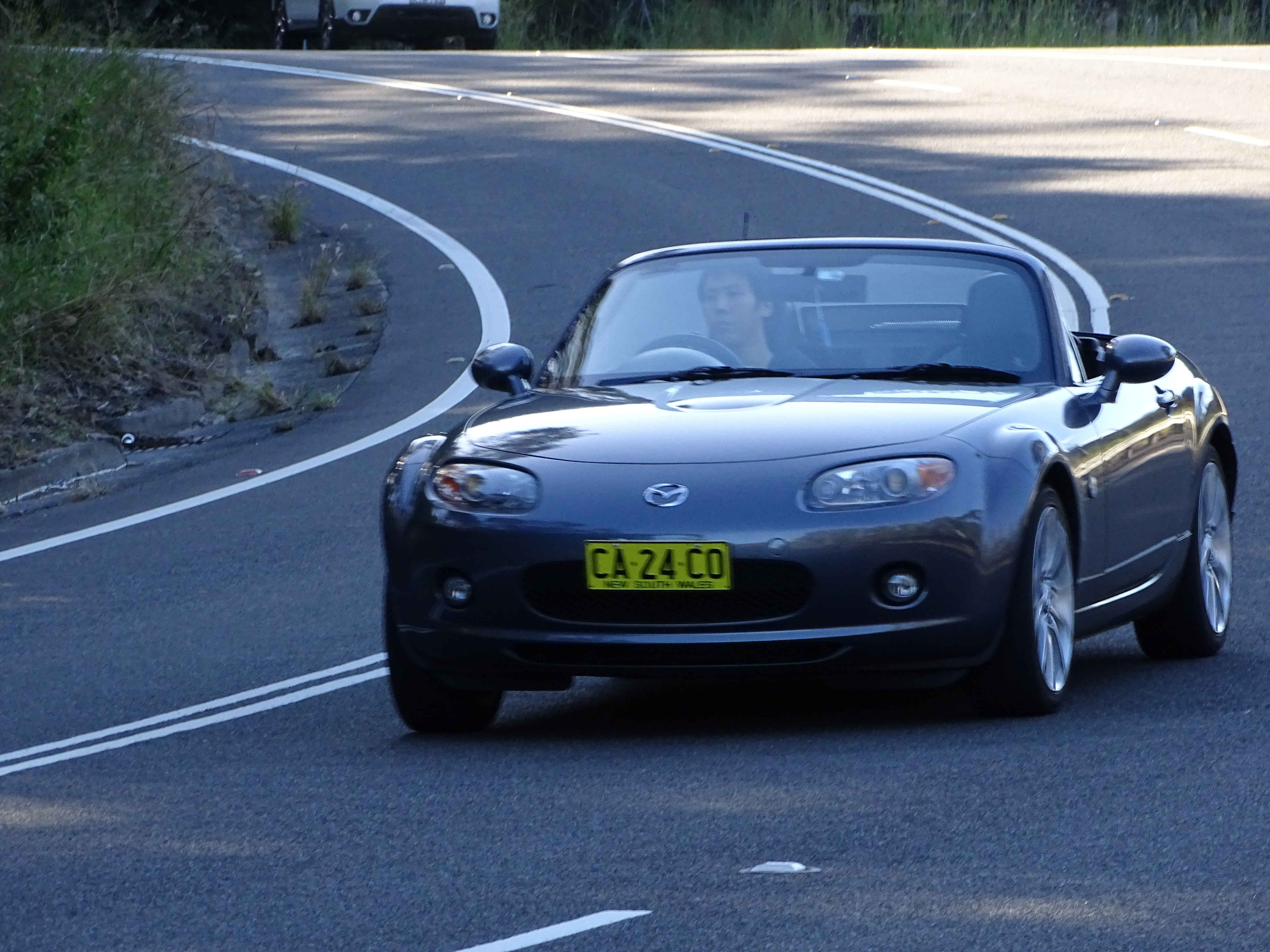 Mazda MX5